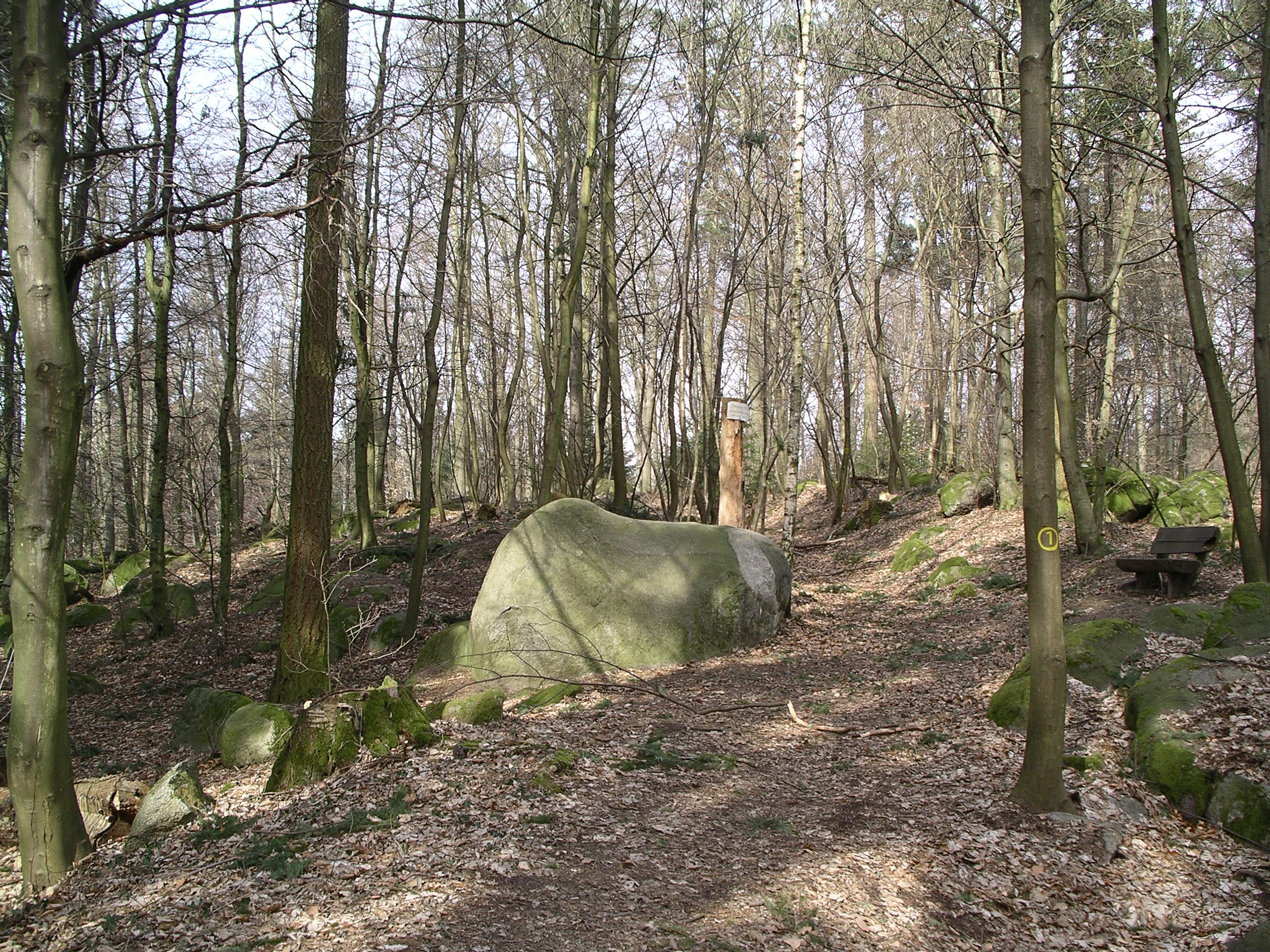 Der "Steinerne Gaul", markierte laut Lorscher Kodex die Gemarkung von Hemsbach, auf dem Höhenweg von Waldnersturm zum Kreuzberg (nahe Parkplatz Schaumesklingel)